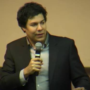 En una conferencia en 2015